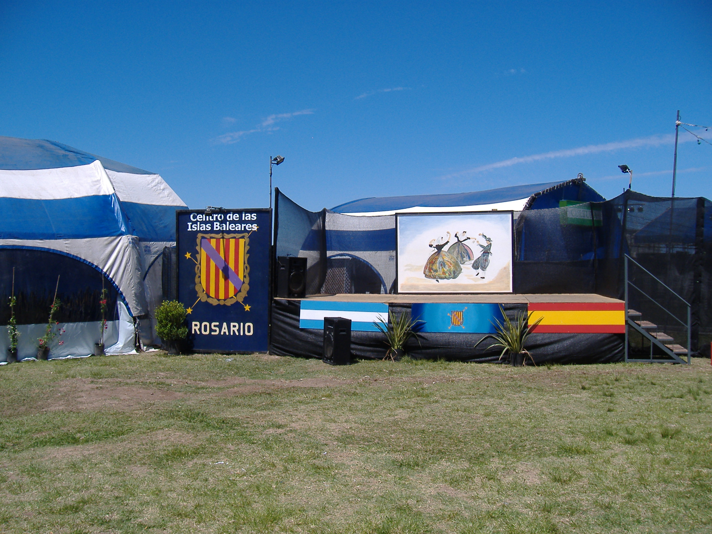 The Balearic Islands's place at the Encuentro y Fiesta Nacional de Colectividades, Rosario, Argentina.